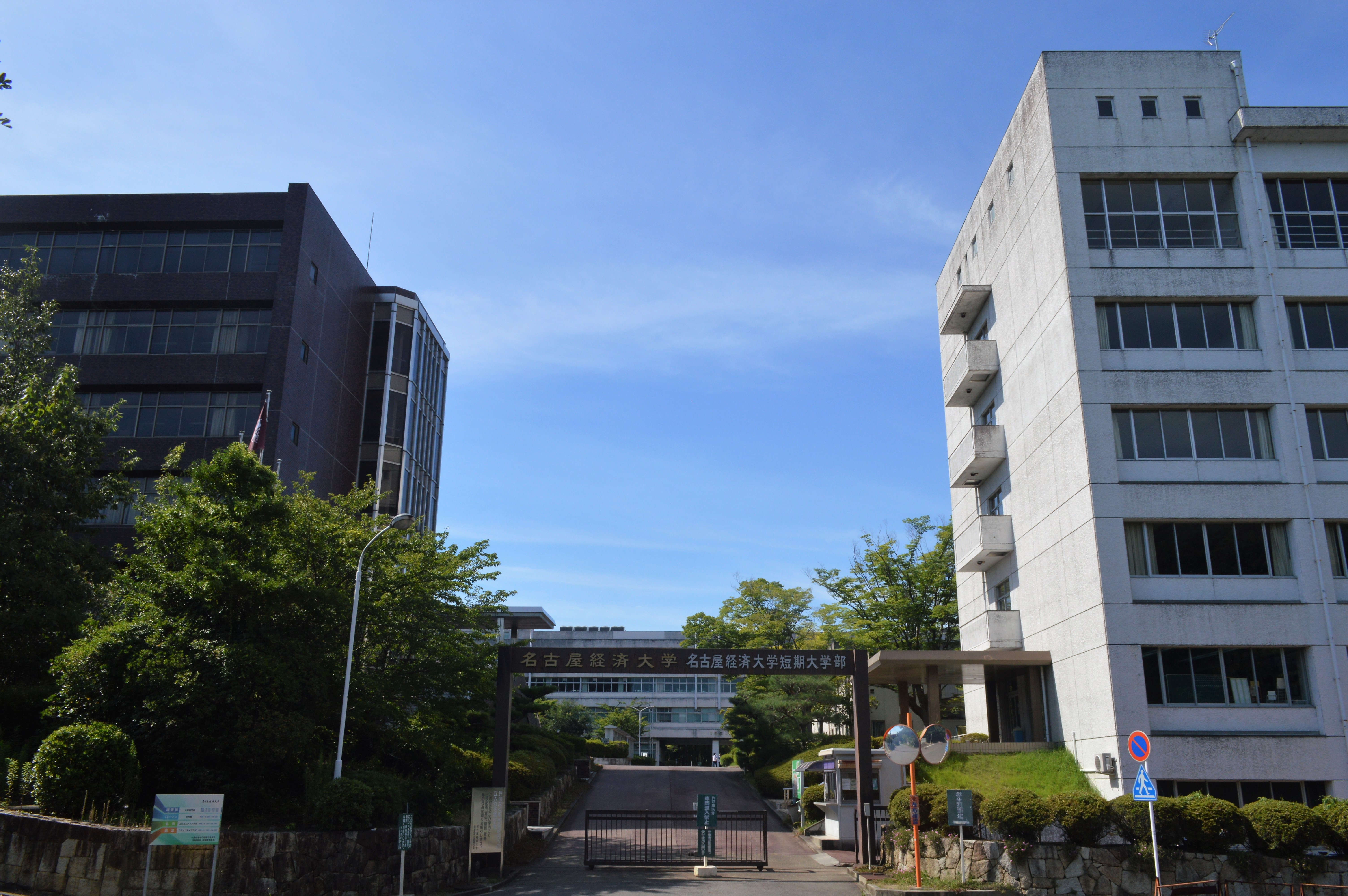 愛知県犬山市の名古屋経済大学犬山キャンパス。